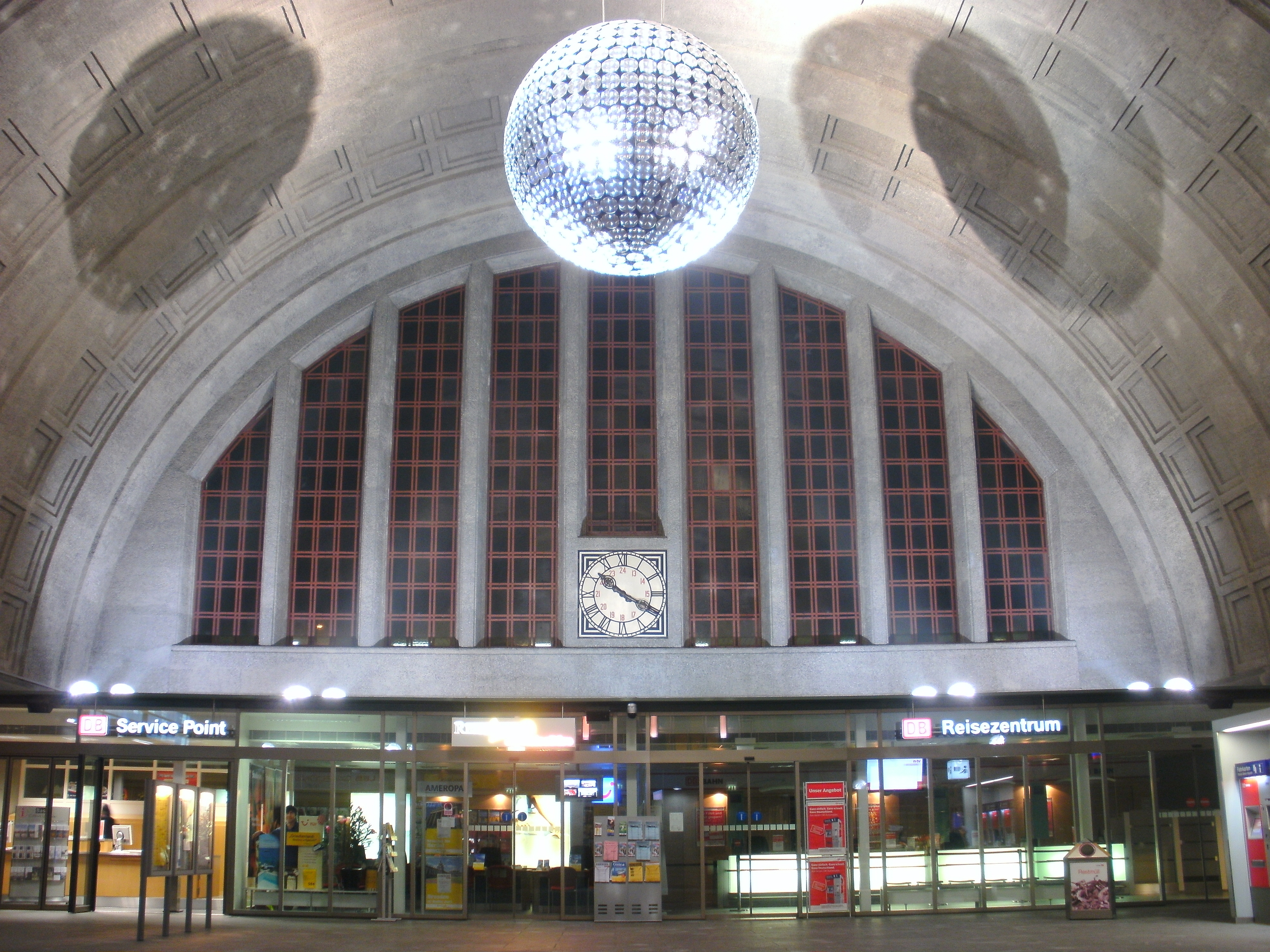 Badischer Bahnhof in Basel, Innenansicht der Schalterhalle